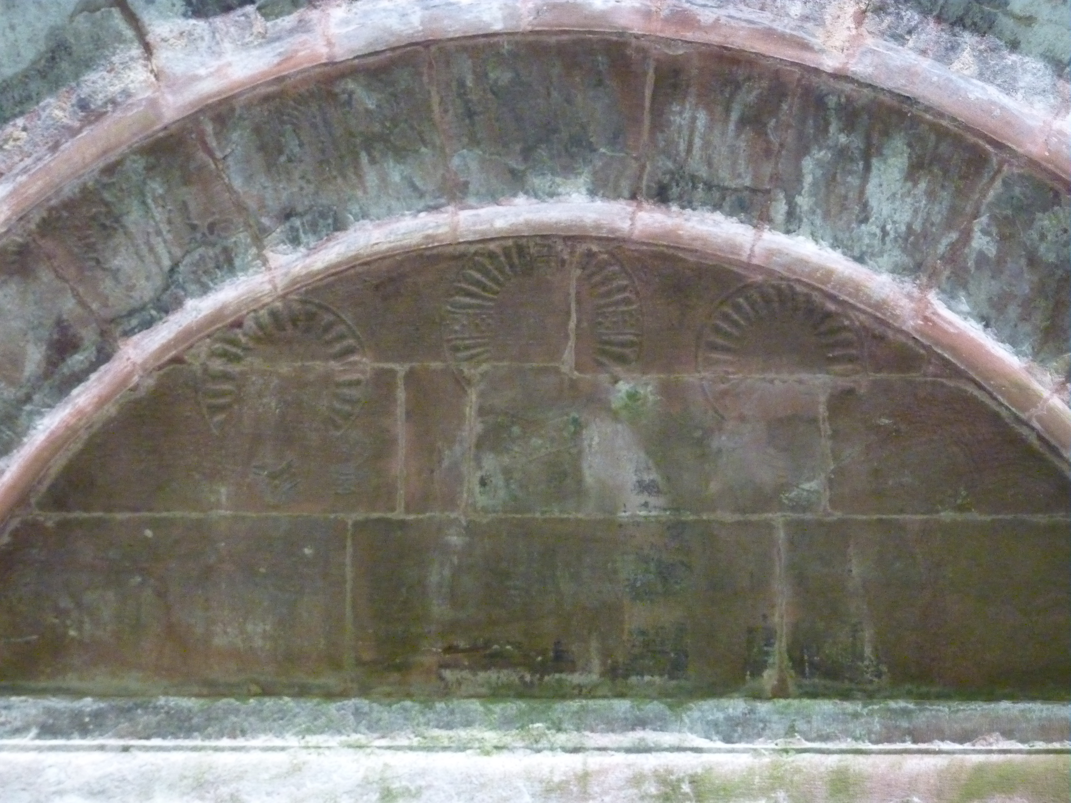 Auréoles sculptées en bas-relief sur la voûte du porche côté nef, église abbatiale, abbaye de Niedermunster, Bas-Rhin, France. .